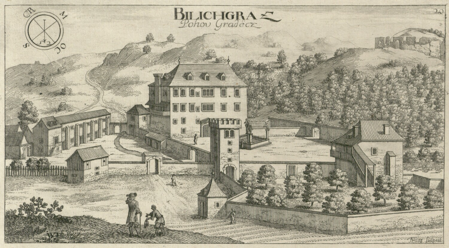 Dvorec Polhov Gradec